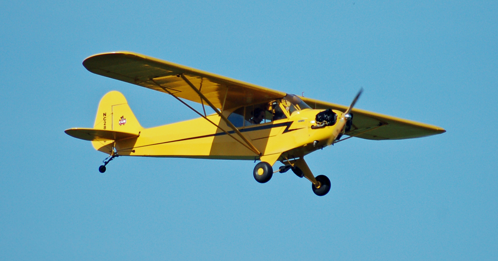 Gelbe Piper PA-18 Super Cub über dem Flugplatz Uetersen